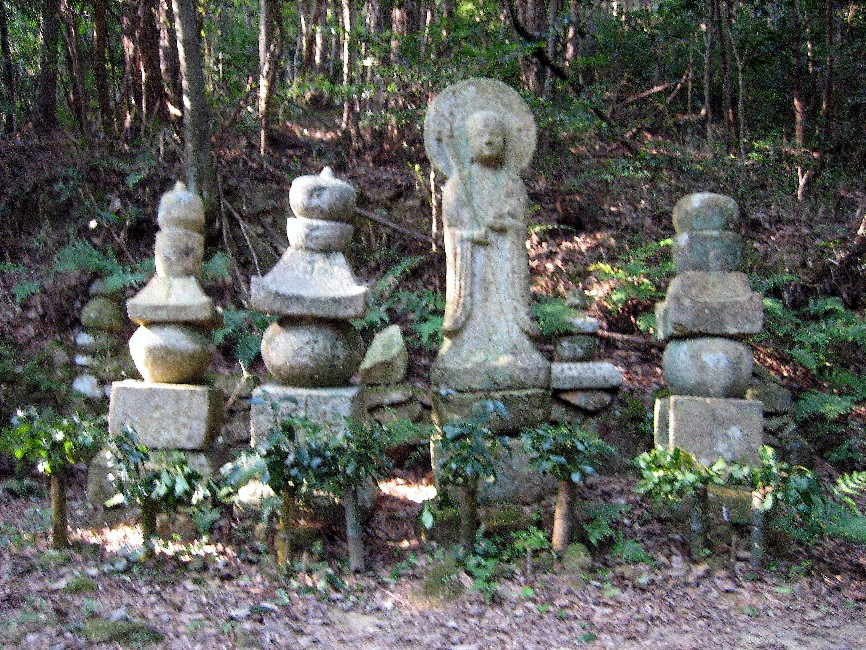 姫路市置塩にある『文化財 長福山松安寺跡墓石群』。赤松義祐が建立したと伝えられる赤松家菩提寺松安寺の跡地。そこに残る赤松家の墓。右より赤松義祐、赤松晴政、晴政の妹の順に五輪塔が並んでいる。中央にある地蔵像は義祐が建立したと伝えられている。寺は1975年頃、崩壊し、その後、廃寺となった。寺の遺構はほぼ無く、池と境内への石段および赤松家とその他の墓しか残っていないようである。